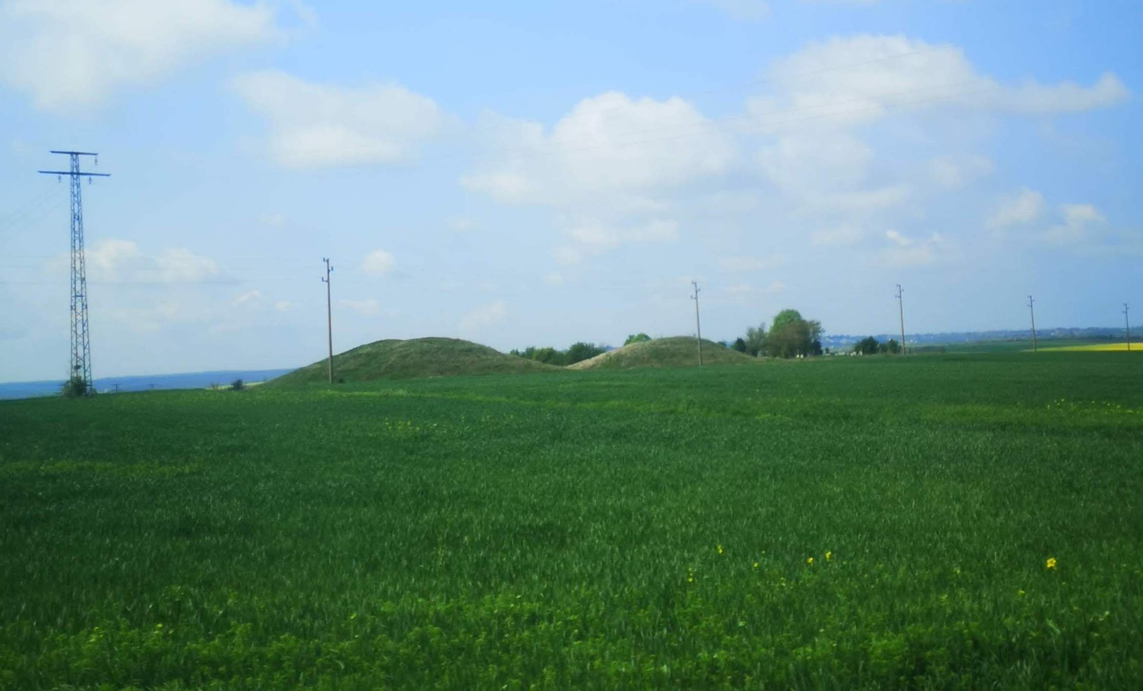 Estas son las dos colinas que dan nombre a la ciudad y que pueden ser de origen tracio o romano